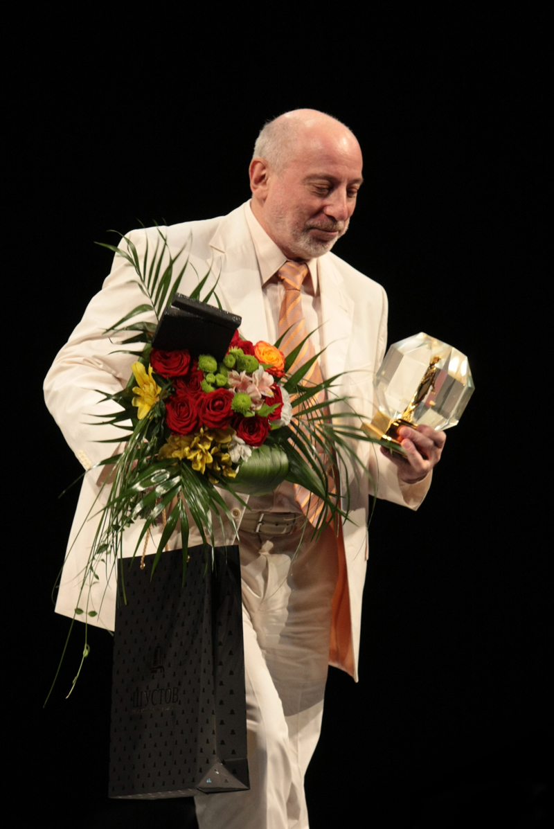 Юрий Мамин получает на Первом одесском кинофестивале свой отреставрированный приз фестиваля Золотой Дюк-1988